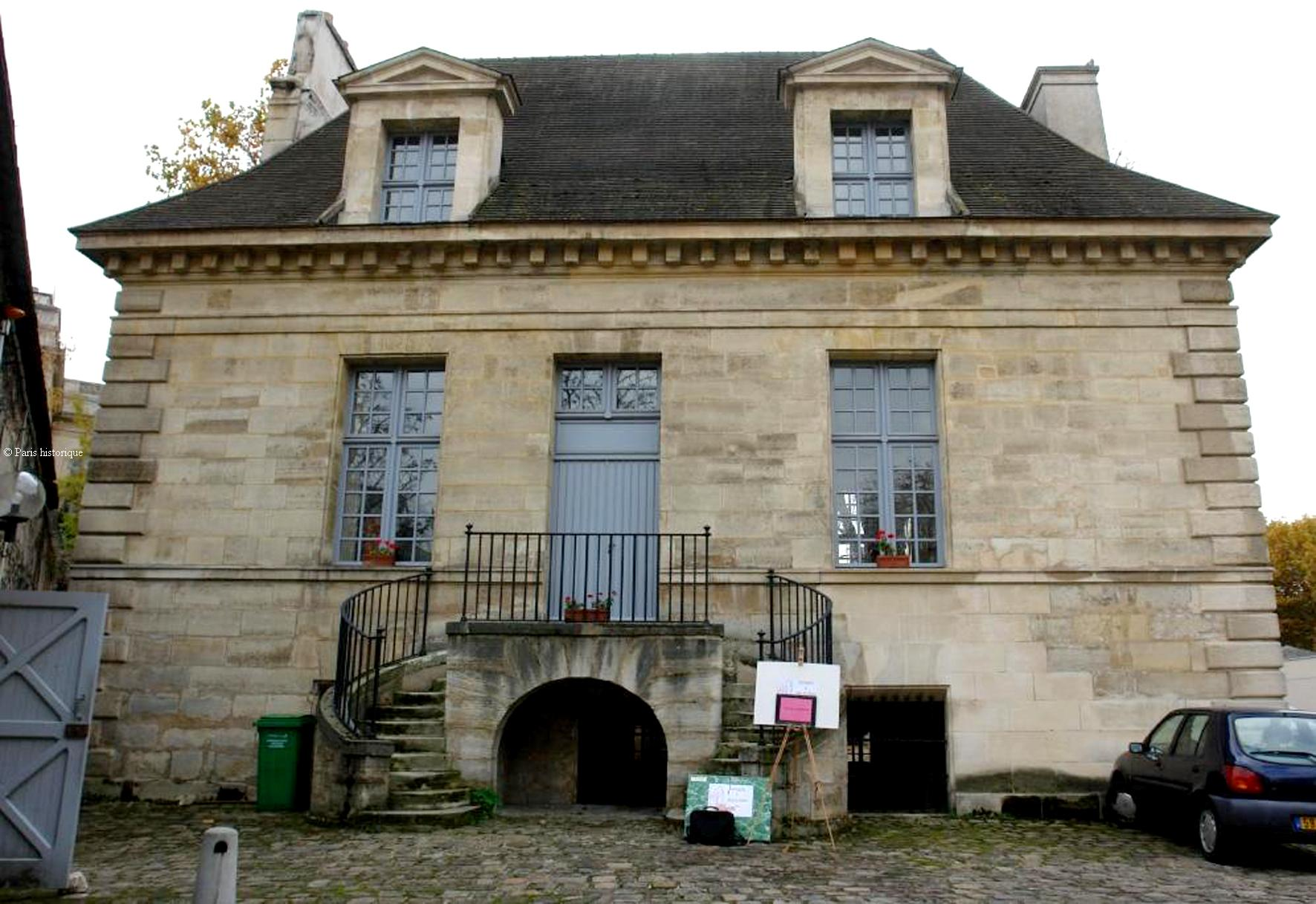 Perron en fer-à-cheval de la façade sud de la Maison du Fontainier (Château d'eau de l'Observatoire), 42 Avenue de l'Observatoire, XIVe arrondissement, Paris